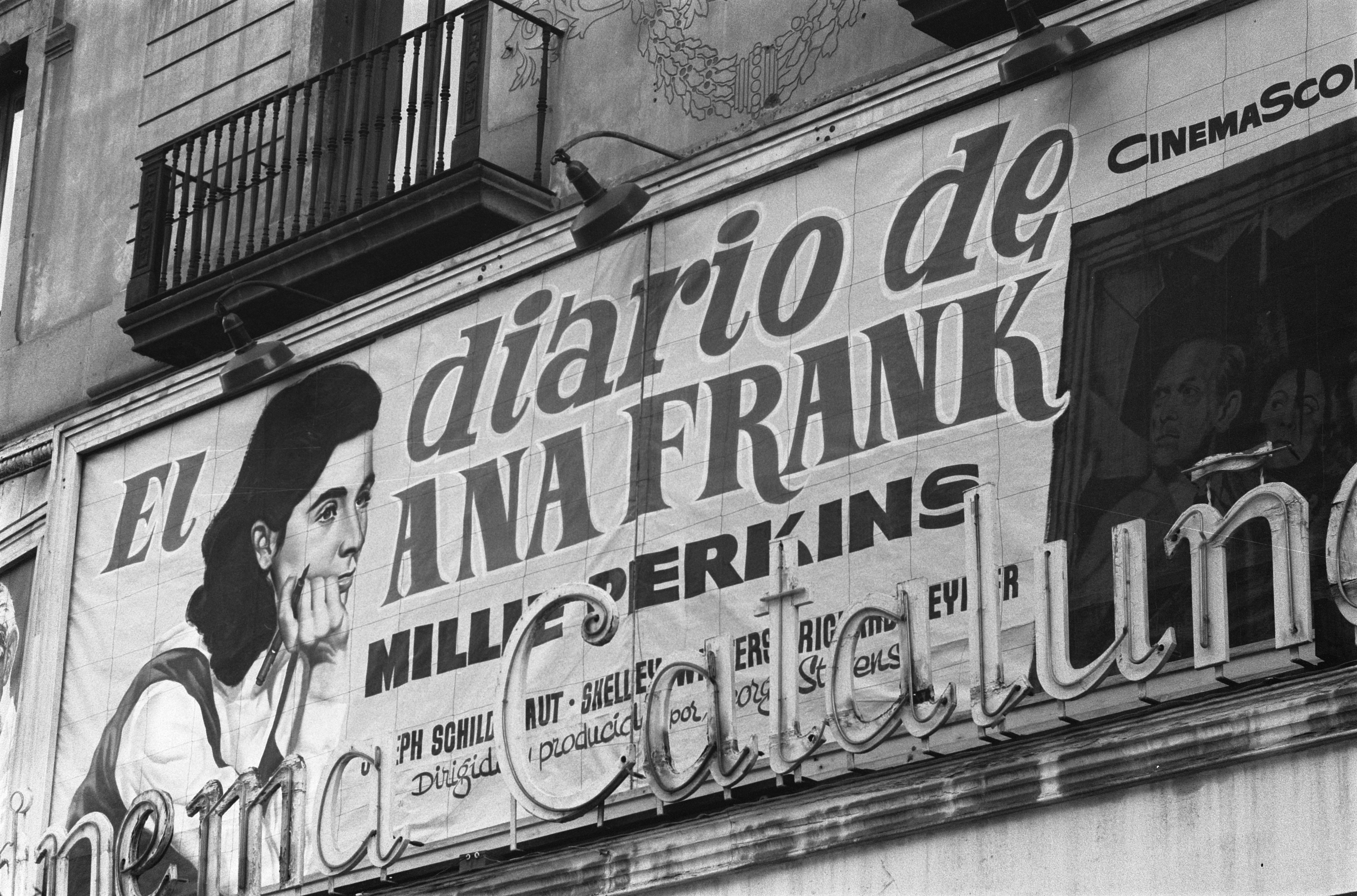 Collectie / Archief : Fotocollectie Anefo Reportage / Serie : [ onbekend ] Beschrijving : Serie over Spanje Datum : 5 oktober 1960 Locatie : Spanje Trefwoorden : bioscopen, reclames Persoonsnaam : anne frank Fotograaf : Pot, Harry / Anefo Auteursrechthebbende : Nationaal Archief Materiaalsoort : Negatief (zwart/wit) Nummer archiefinventaris : bekijk toegang 2.24.01.05 Bestanddeelnummer : 911-6498